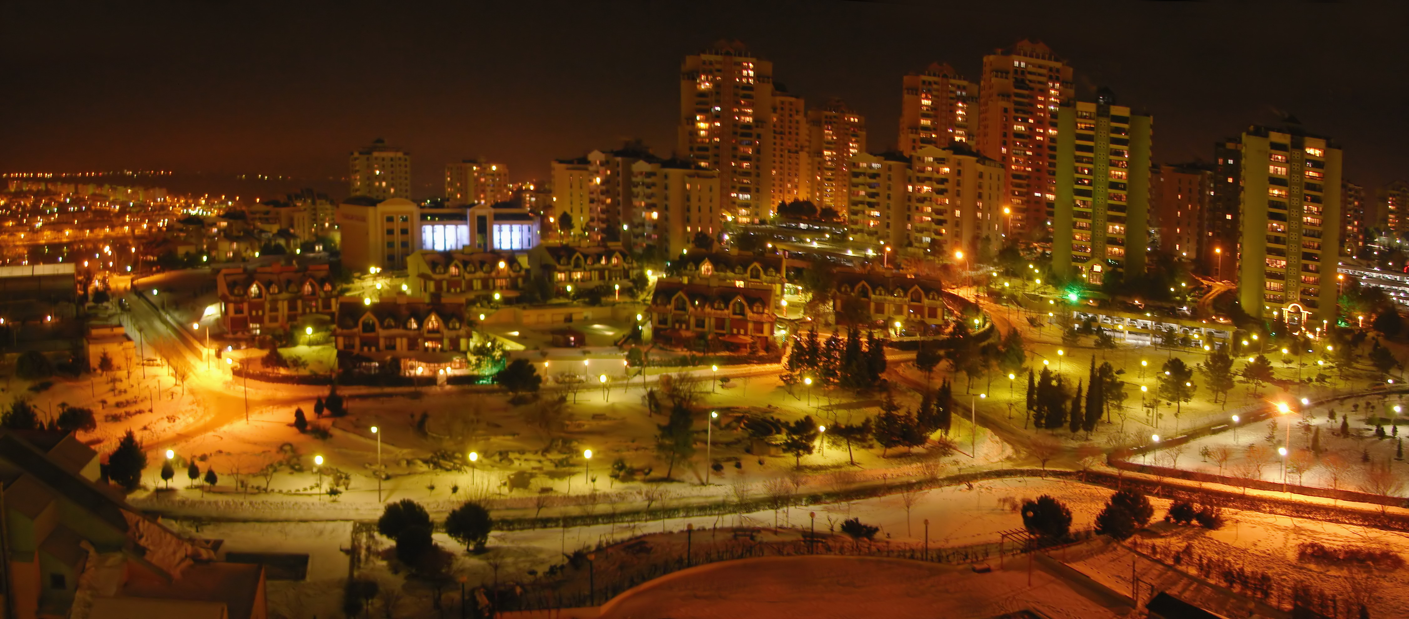 Bahçeşehir